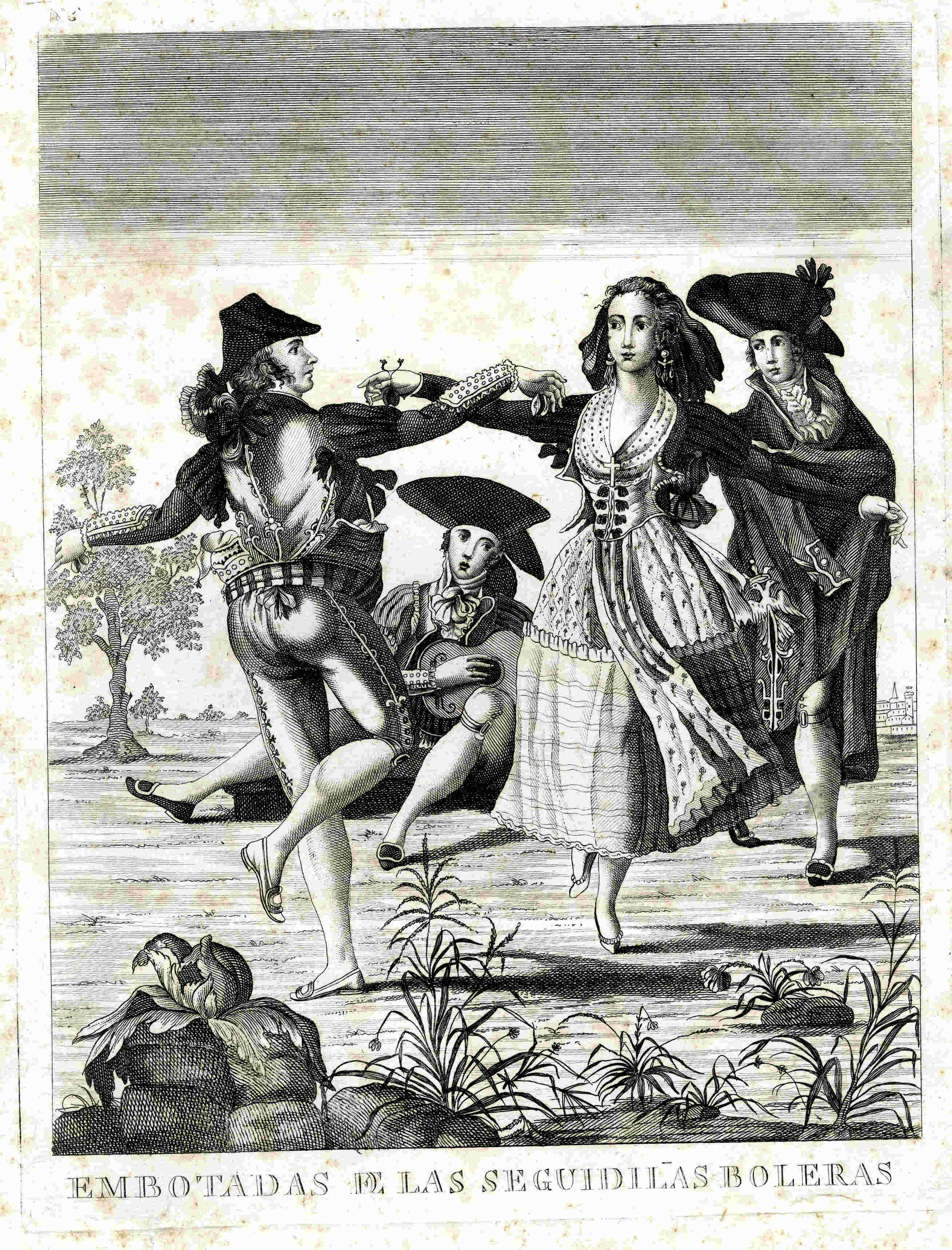 Seguidilla bolera. Gravat del s.XVIII